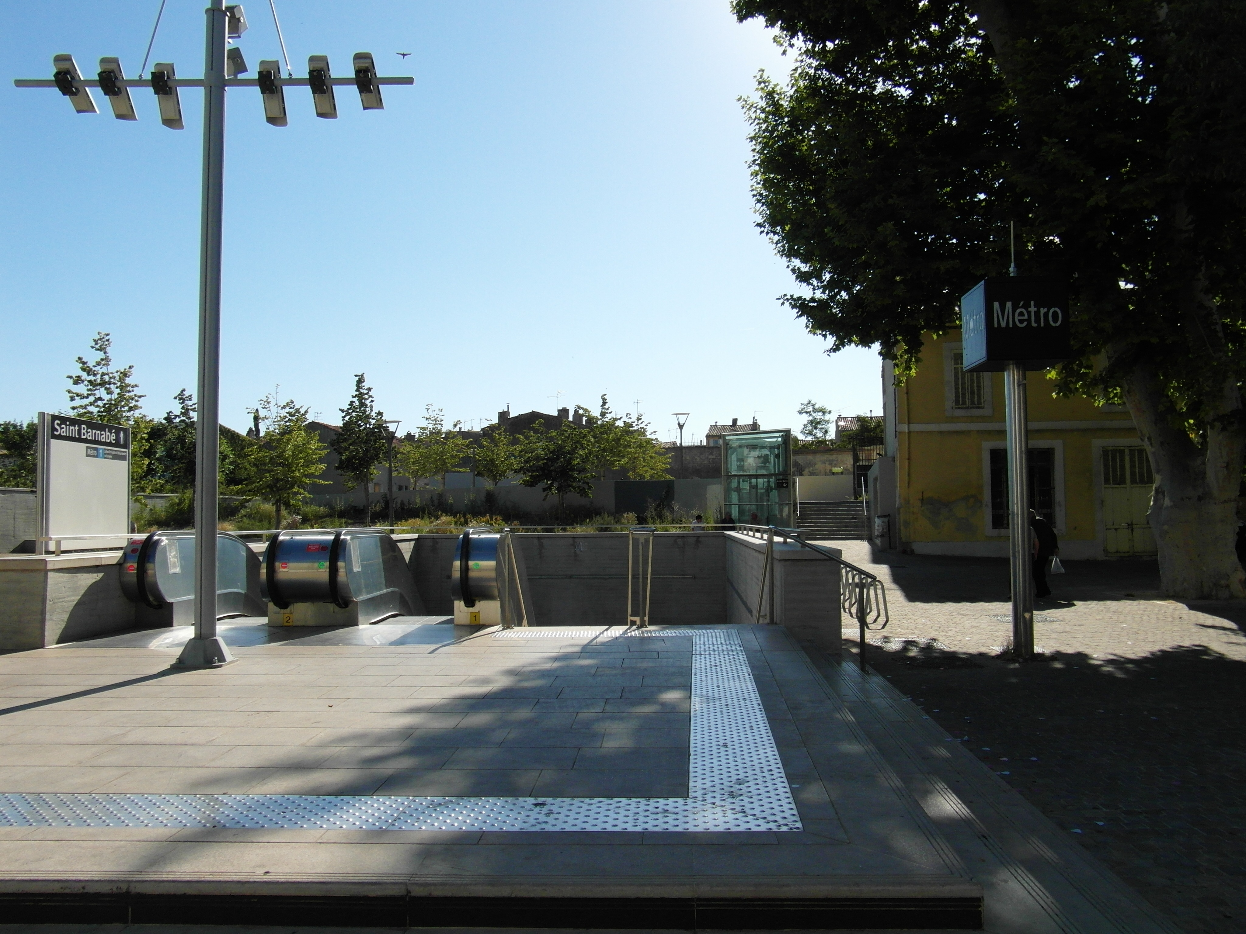 Marseille - Métro - Saint-Barnabé